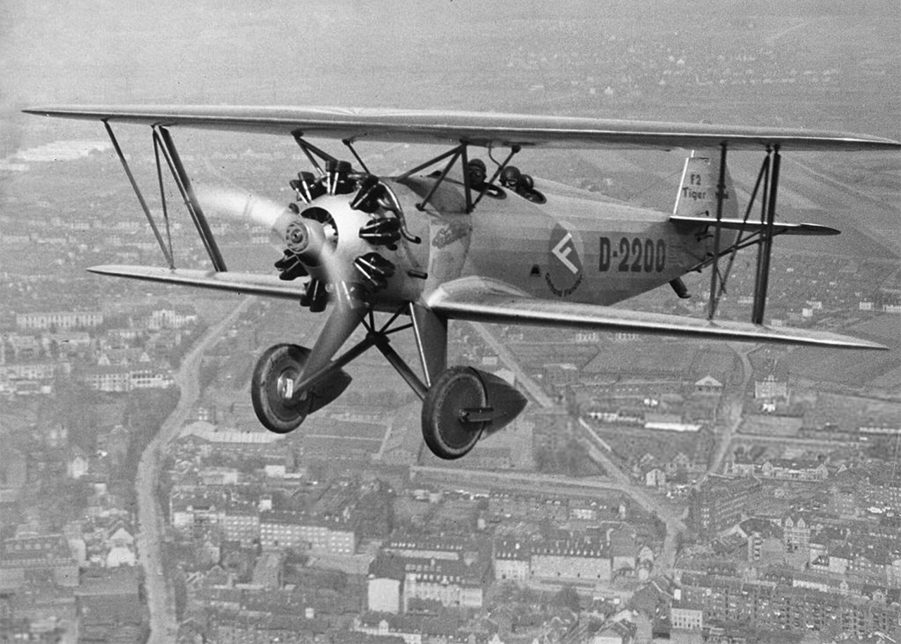 Fieseler F 2 Tiger (D-2200) 1932 über Kassel. [Am linken Bildrand die Mönchebergstraße mit den Städtischen Kliniken, von der Bildmitte nach rechts unten die Ihringshäuser Straße.]